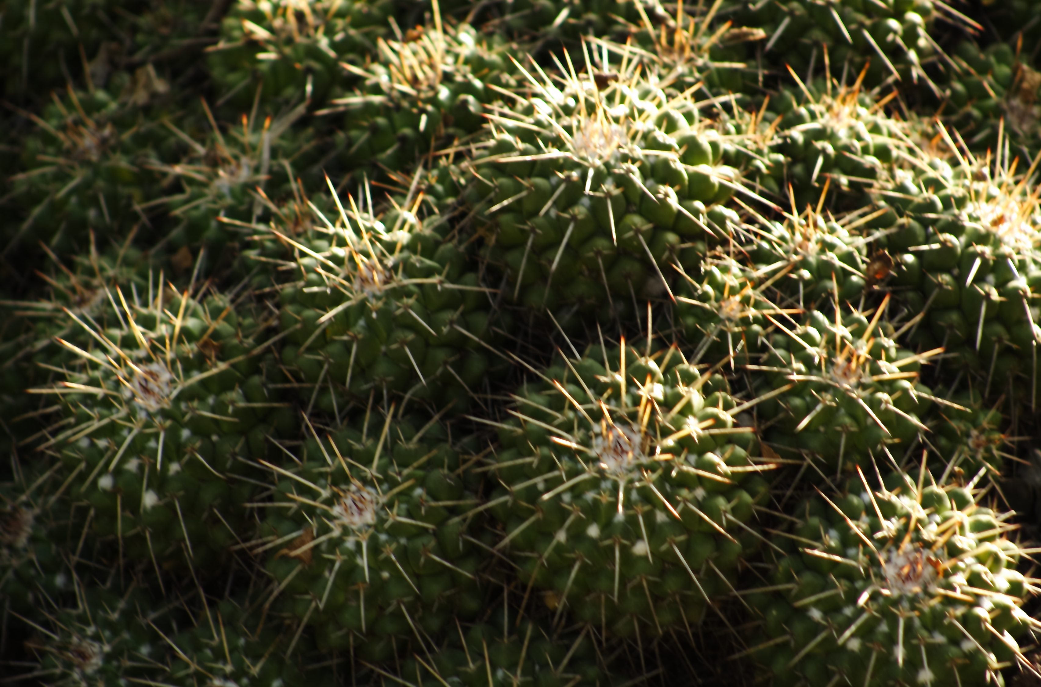 Cactáceas en la Facultad de Estudios Superiores Cuautitlán.